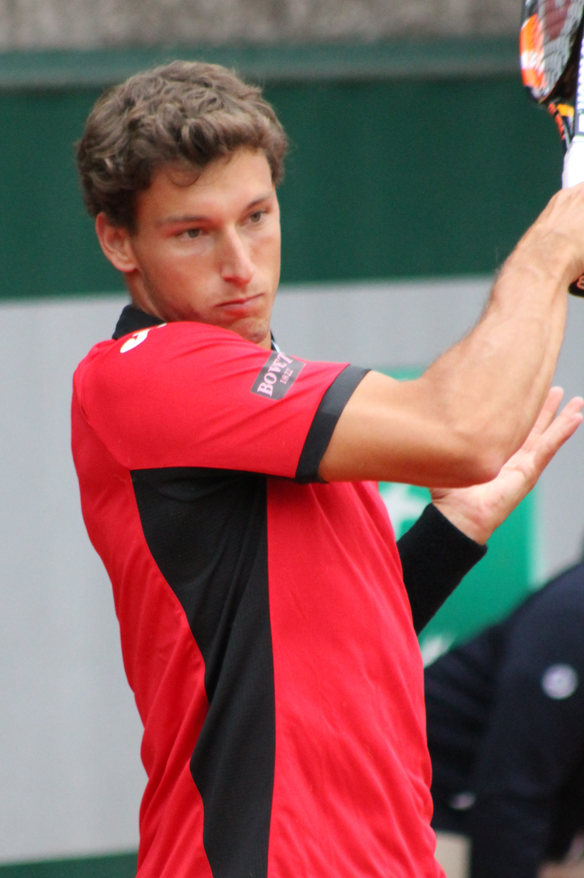 Carreno Busta RG15 (18)